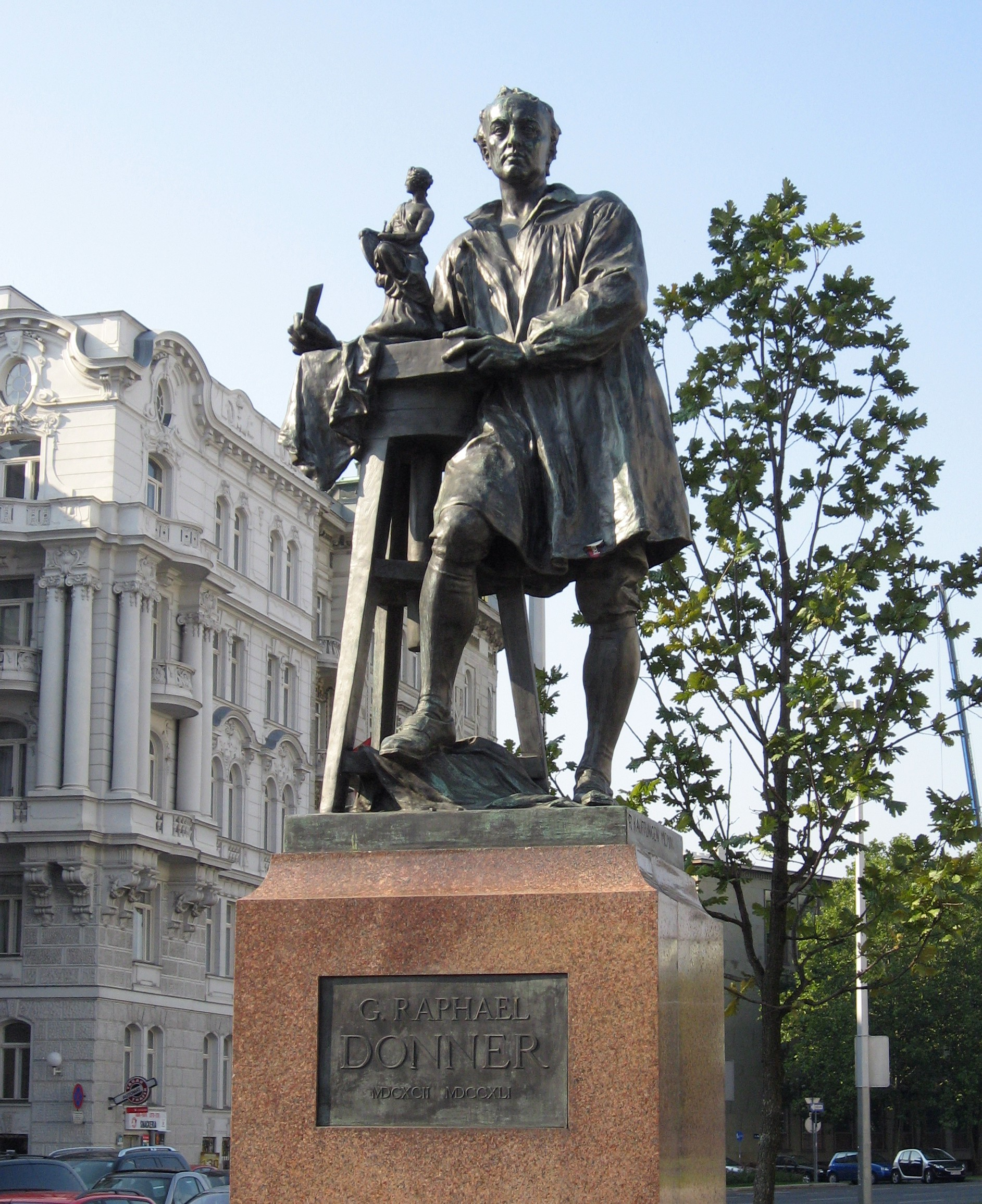 Wien, Karlsplatz, Denkmal von Georg Raphael Donner